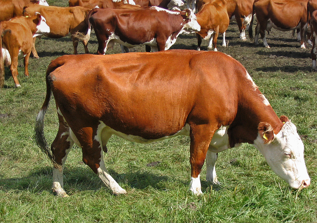 Beschreibung: Rotbuntes Rind Fotograf: Darkone, 2. September 2004